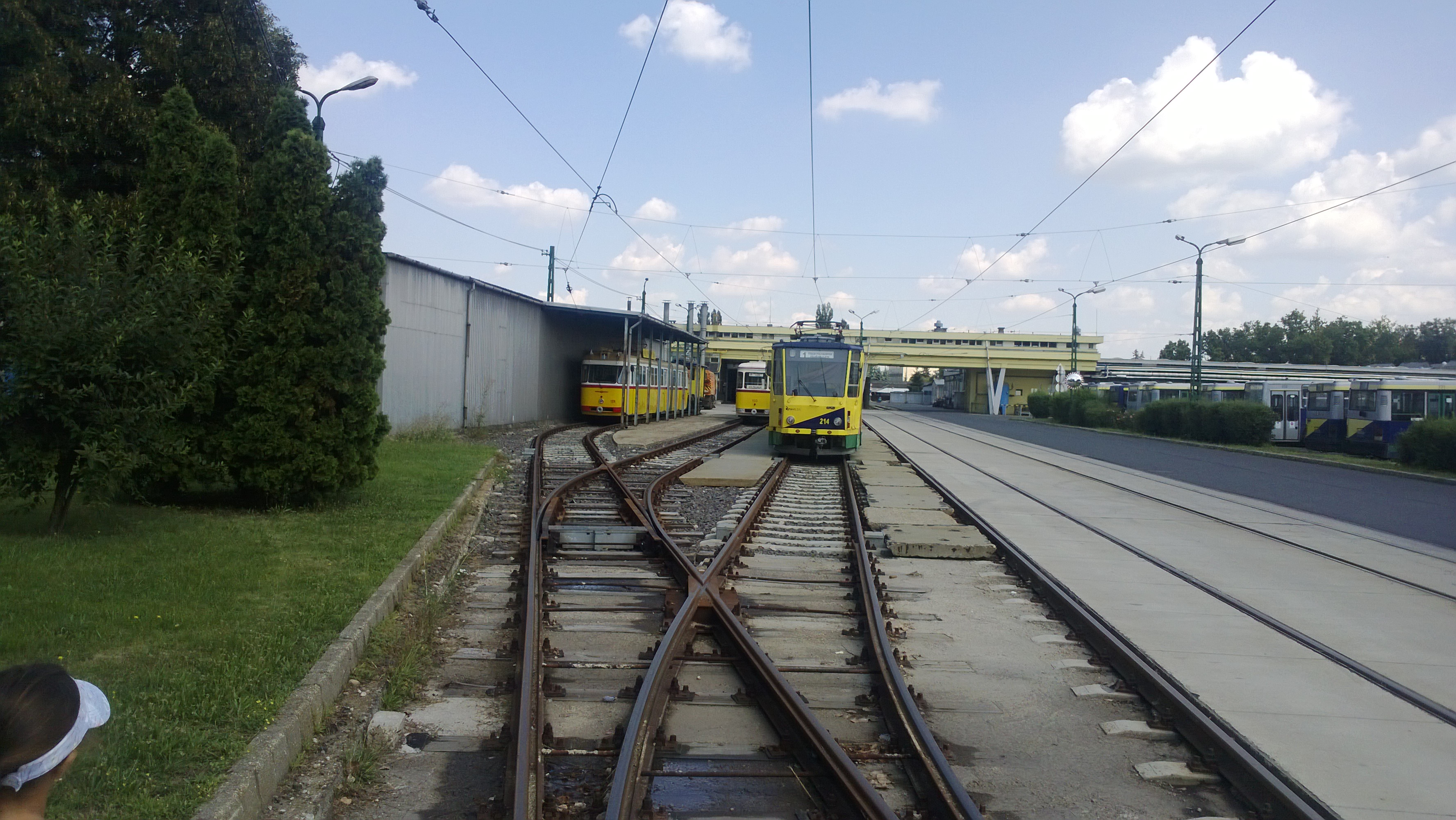 Miskolc járműállománya, Bengáli 100, 151 és Tátra 214 villamos a felújított remízben